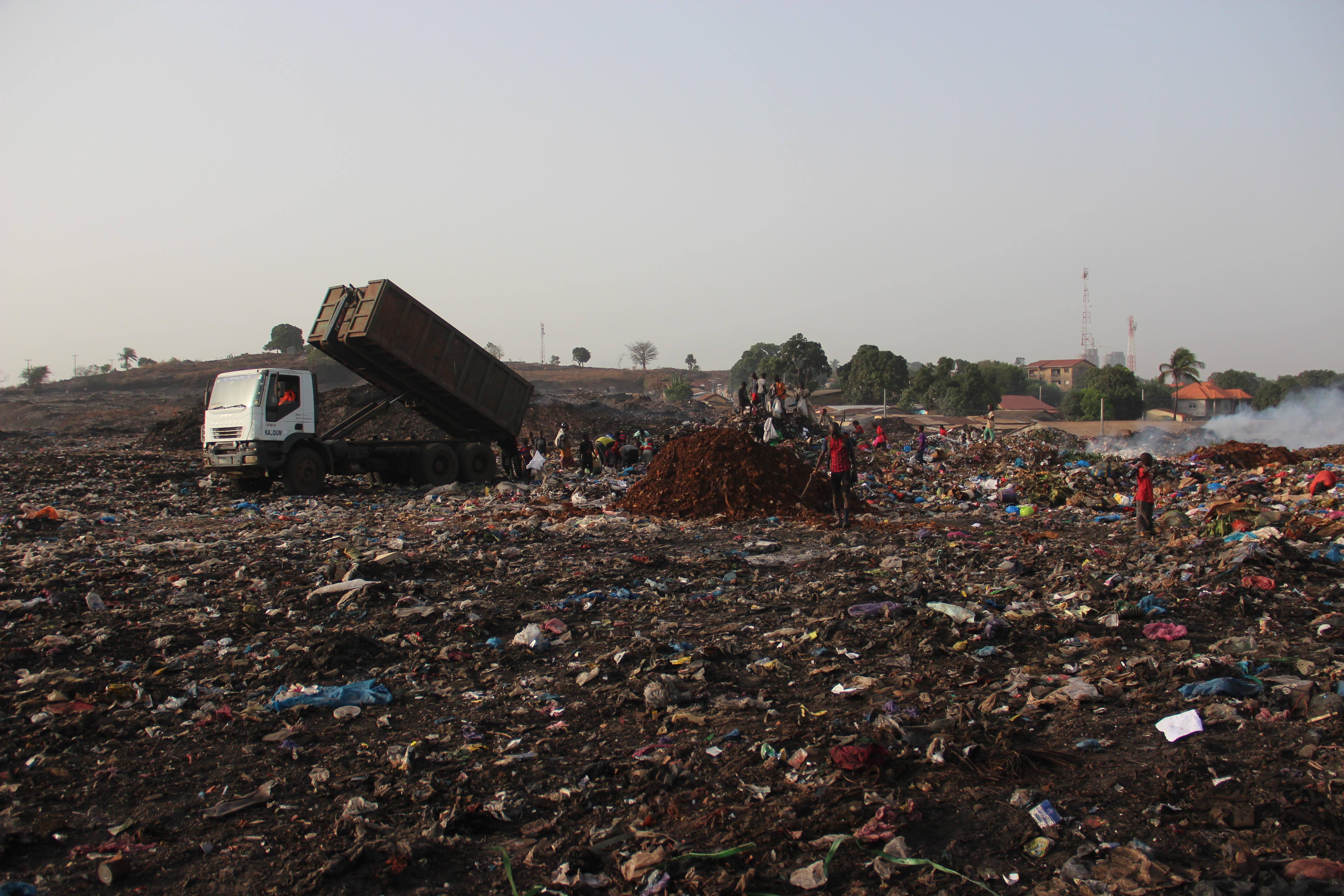 Camion benne qui se déverse à la décharge de la Minière à Conakry en 2017. This is an image with the theme "Africa on the Move or Transport" from: Guinea